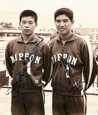 Yukiaki Okabe and Makoto Fukui